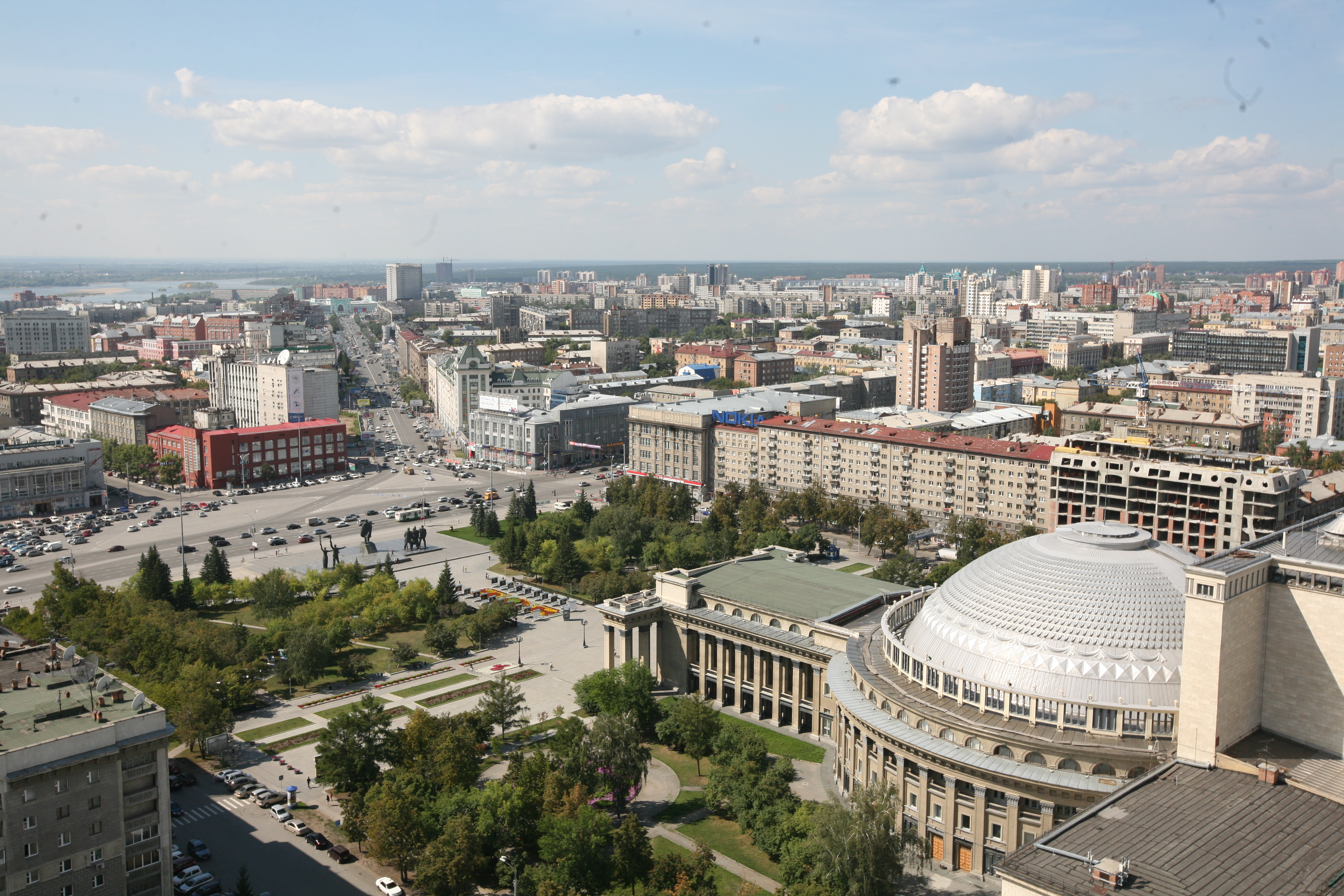 Здание Новосибирского театра оперы и балета: Красный проспект, 36, Центральный район, Новосибирск, Новосибирская область